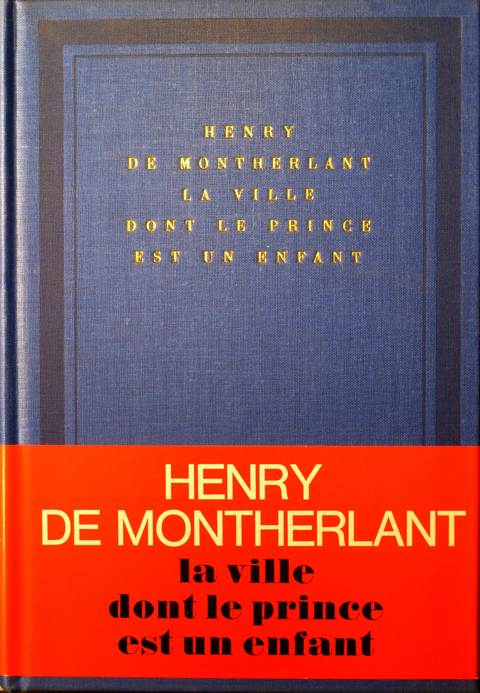 Collection Soleil (Gallimard) N°133, 1963-1972. La ville dont le prince est un enfant de Henry de Montherlant. Numéroté B 1110, réimpression. Tirage limité environ 4000 exemplaires (?).